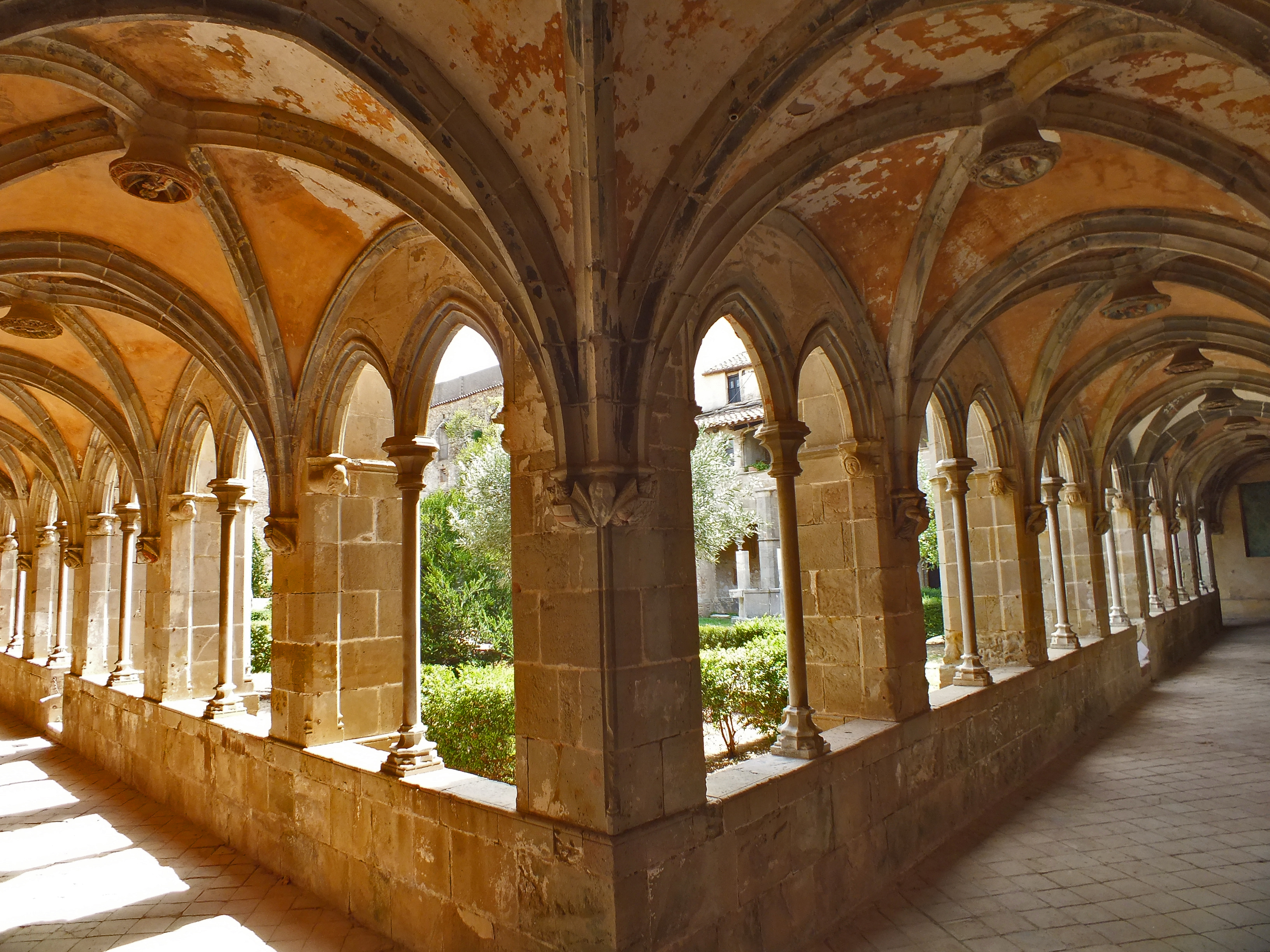 Esta foto participa en el juego En otro lugar de Flickr. Si no perteneces al grupo, no contestes, por favor. Si quieres contestar, únete